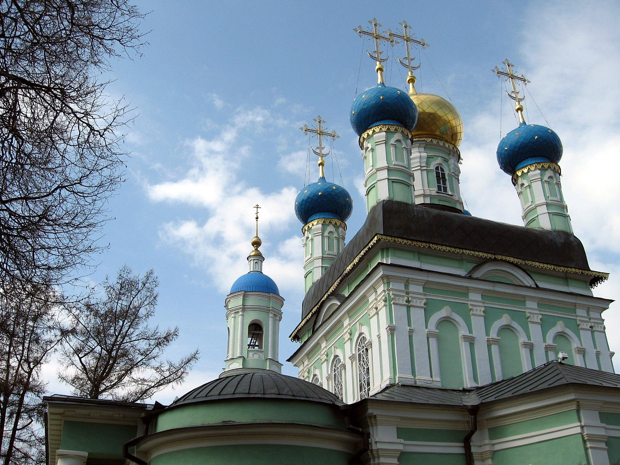 Введенский храм. Здесь почивают святые мощи Преподобных Старцев Амвросия и Нектария.